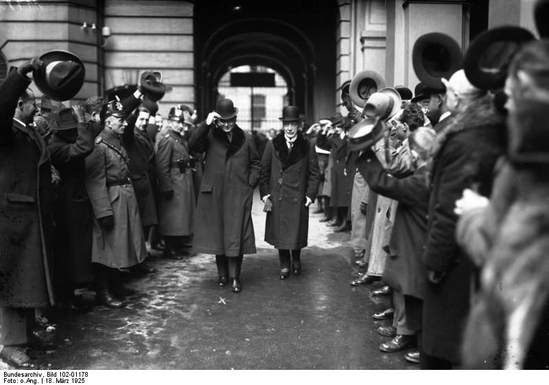 Der Beginn des Wahlkampfes für die Reichspräsidentenwahl. Dr. Jarres, der Kandidat des Rechtsblocks hielt seine erste Wahlrede am 18.3. vor Zehntausenden in der Philharmonie in Berlin. Dr. Jarres x wird nach seiner Propagandarede stürmisch begrüßt. Neben ihm Exzellenz von Loebel, der Vorsitzende des Wahlagitations-Ausschusses (in Berlin) der Rechtsparteien.